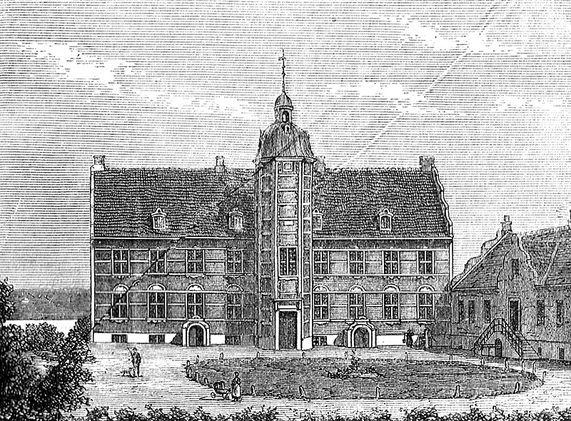 Ulriksholm er dannet i 1525 af Mikkel Pedersen Akeleye, og kaldt Skinnerup. Navnet Ulriksholm er fra 1645. Gården ligger i Kølstrup Sogn, Bjerge Herred, Kerteminde Kommune. Hovedbygningen er opført i 1636-1646 og ombygget i 1828.